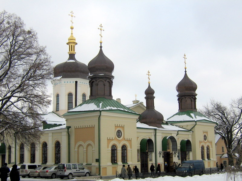 Троїцкая церква Іонинського монастиря